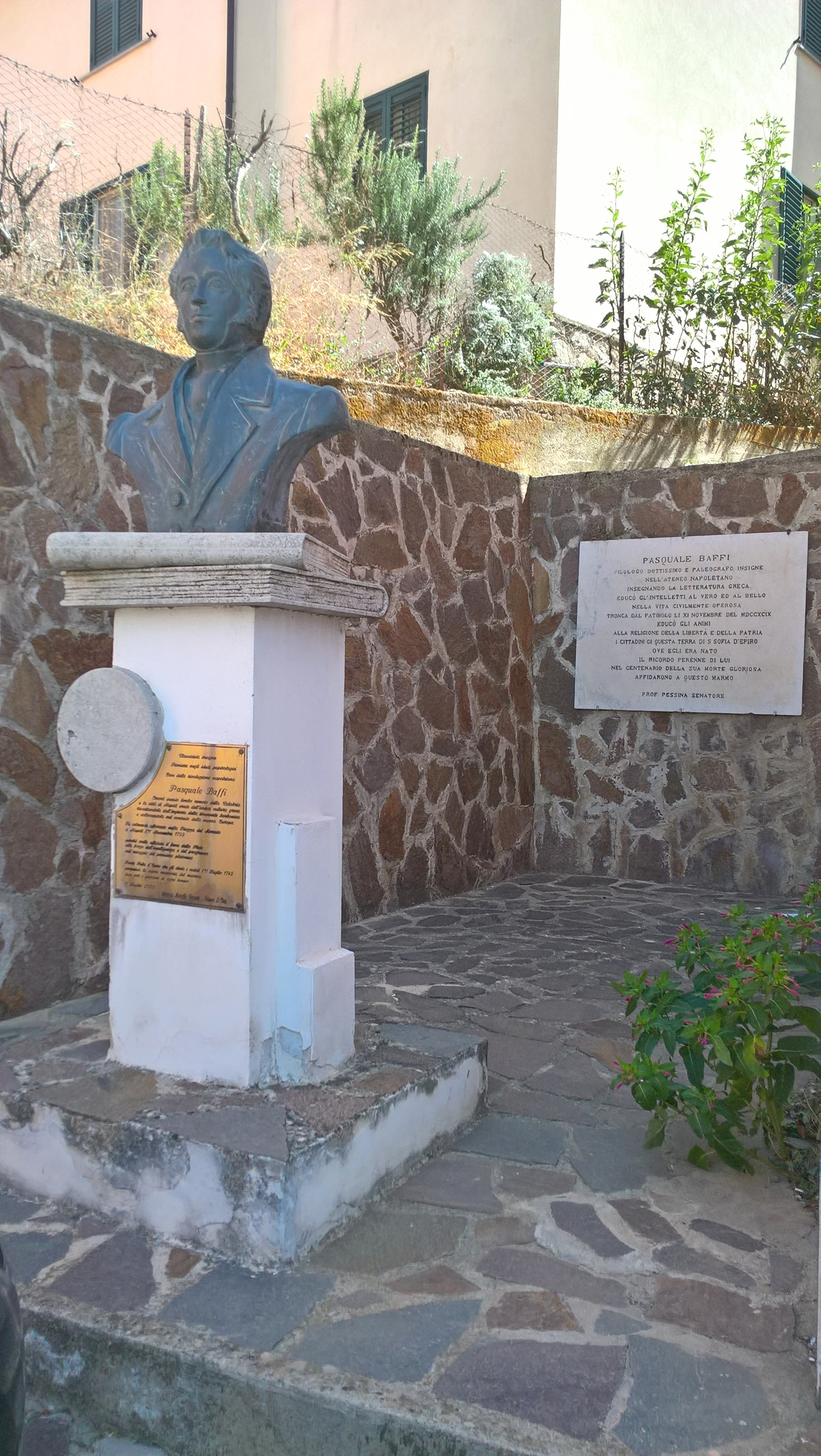 Denkmal Pasquale Baffi, italienischer Revolutionär